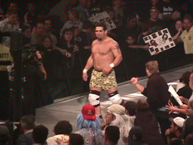 Chaz entrance WWF (WWE) Smackdown